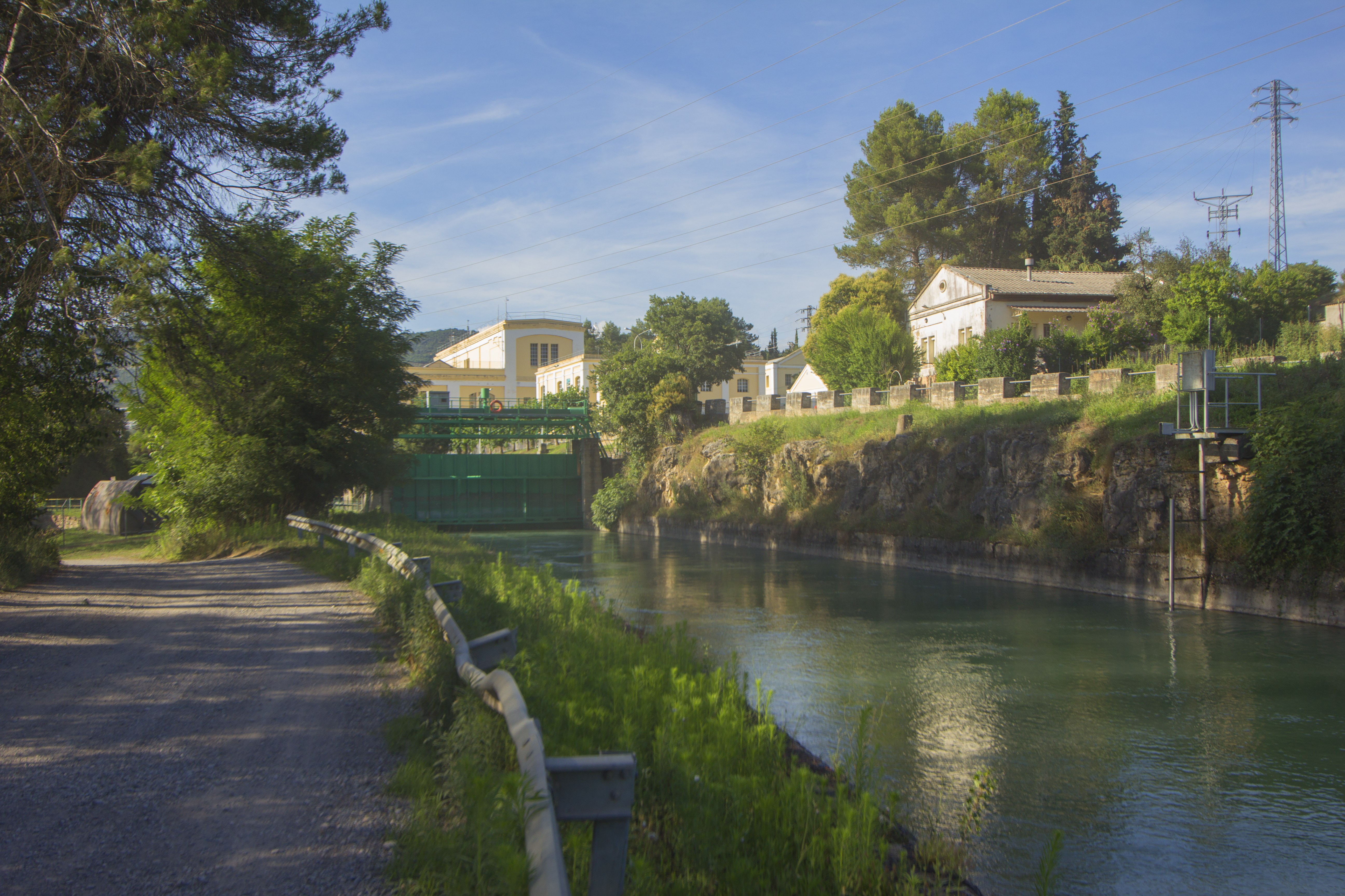 Origen del canal de Gavet a la central hidroelèctrica de Talarn (Pallars Jussà)